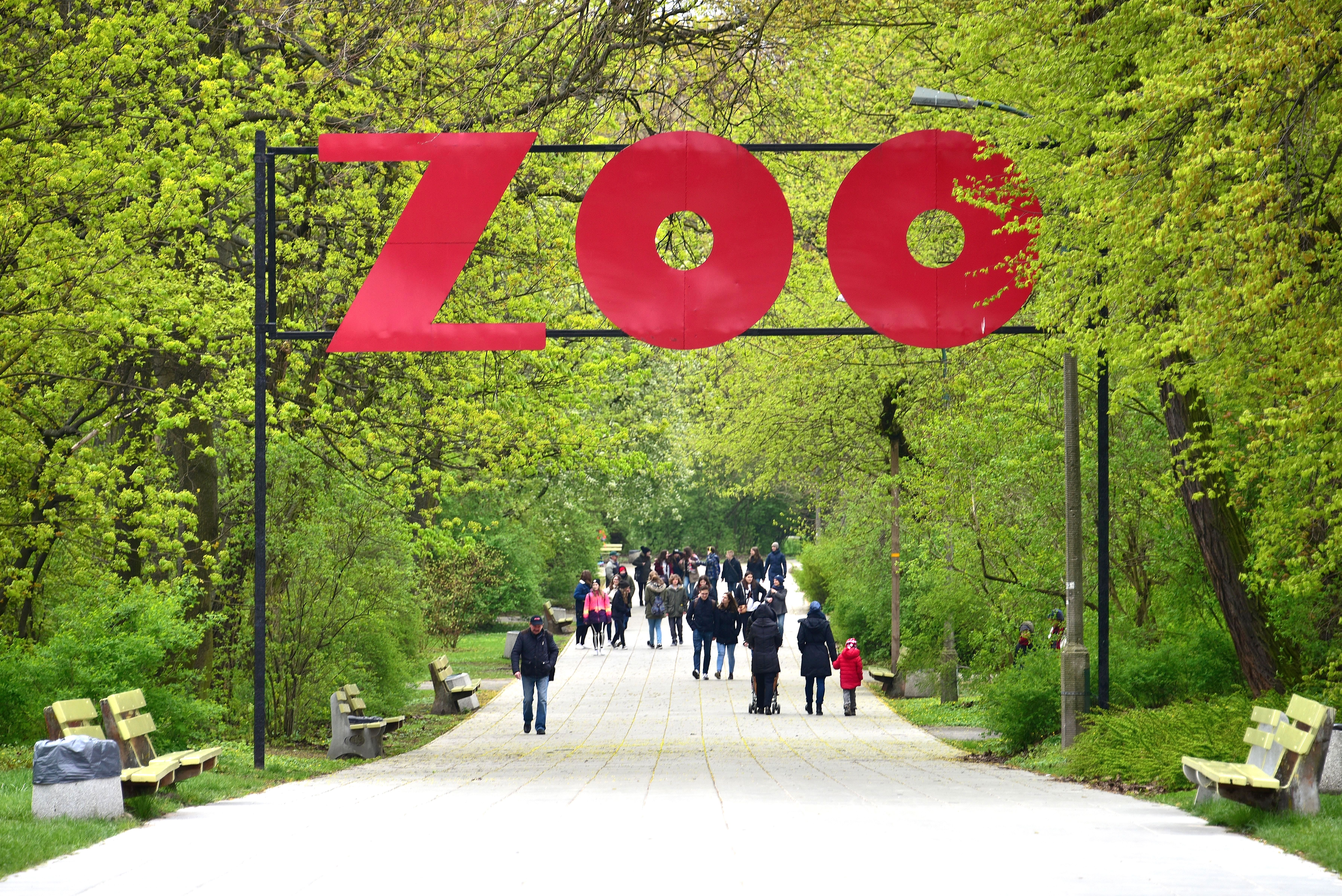 Aleja Kazimierza Lisieckiego „Dziadka” w parku Praskim w Warszawie